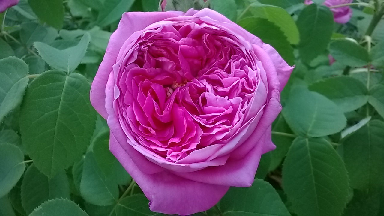 Rose ancienne 'Yolande d'Aragon' obtenue en France par Vibert en 1843, au parfum exceptionnel.